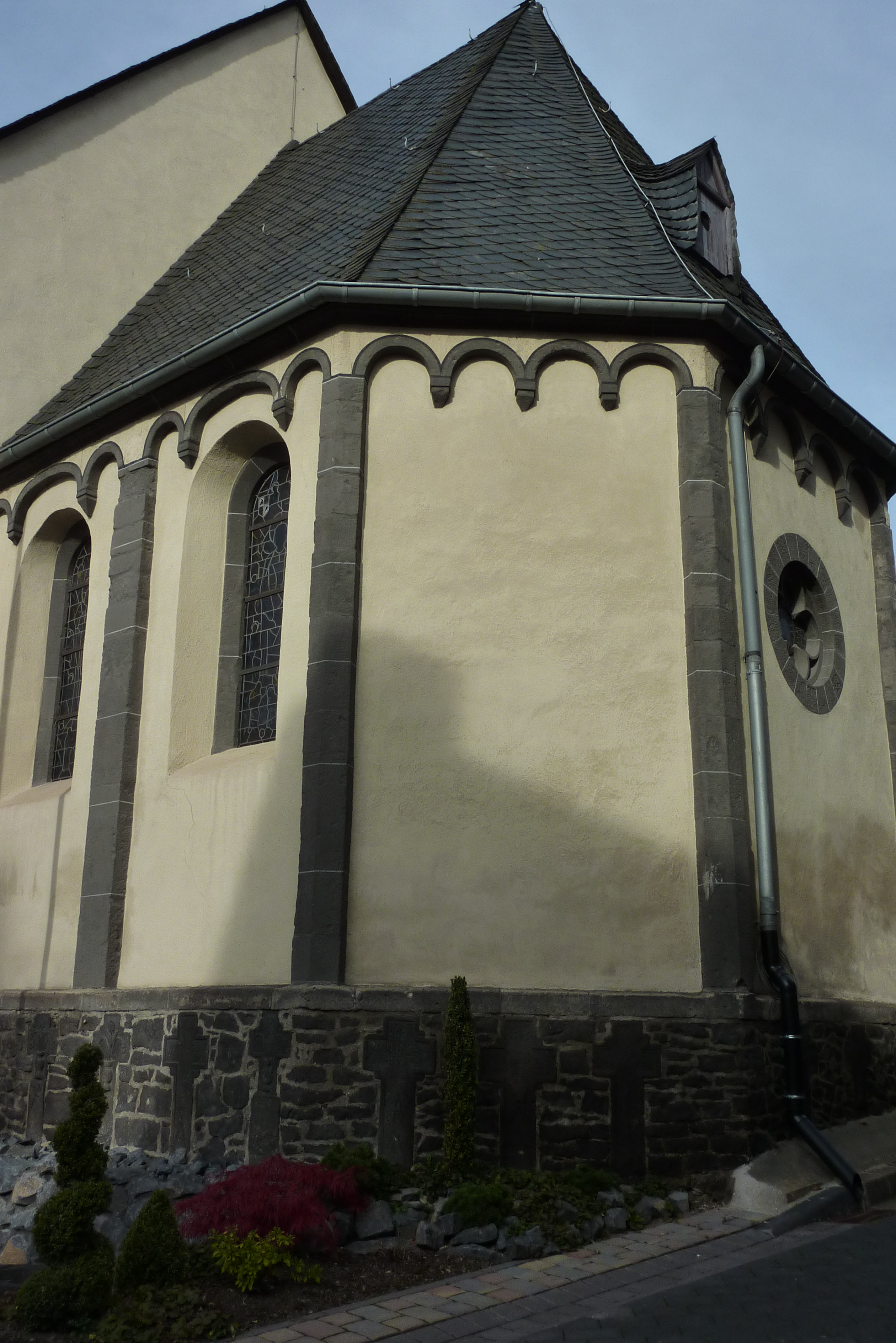 katholische Pfarrkirche St. Hubertus in Rieden, Chor von außen